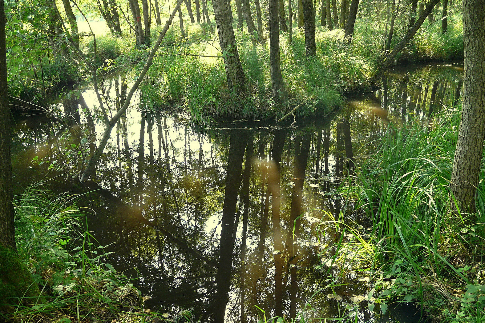 Břehyňský potok